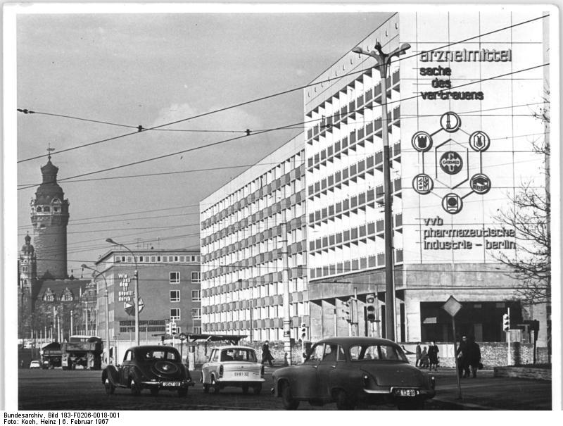 Leipzig, Bayrischer Platz, Wohnblocks Zentralbild Koch 6.2.1967 Leipzig: Ständig verschönert sich das Gesicht der Messemetropole Leipzig. Sicherlich sind für viele Besucher der bevorstehenden Leipziger Frühjahrsmesse diese Wohnblöcke am Bayrischen Platz-Ecke Windmühlenstraße neu. Im Bildhintergrund sehen wir das Neue Rathaus.